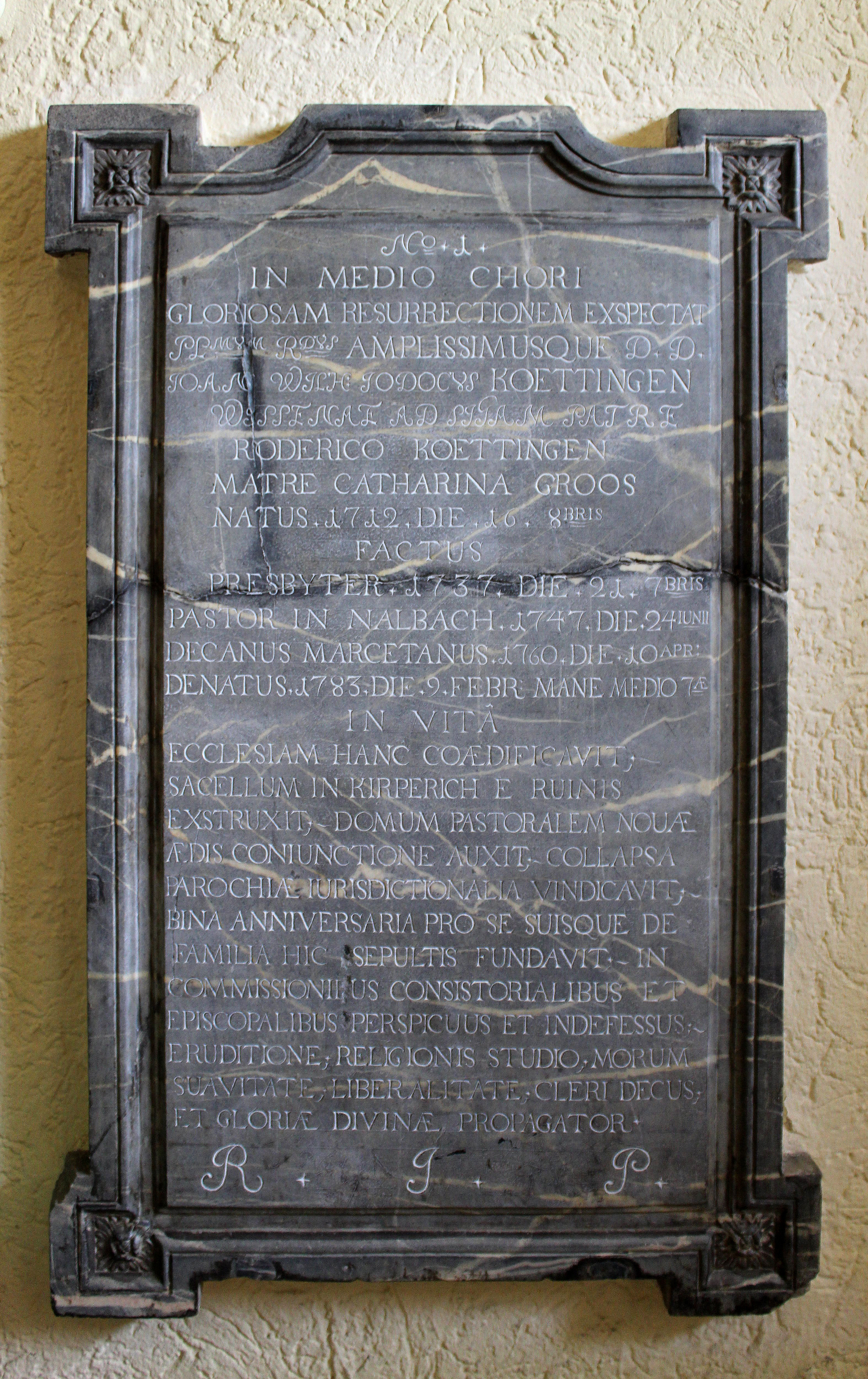 Gedenktafel in der katholischen Pfarrkirche St. Peter und Paul in Nalbach, Landkreis Saarlouis, Saarland